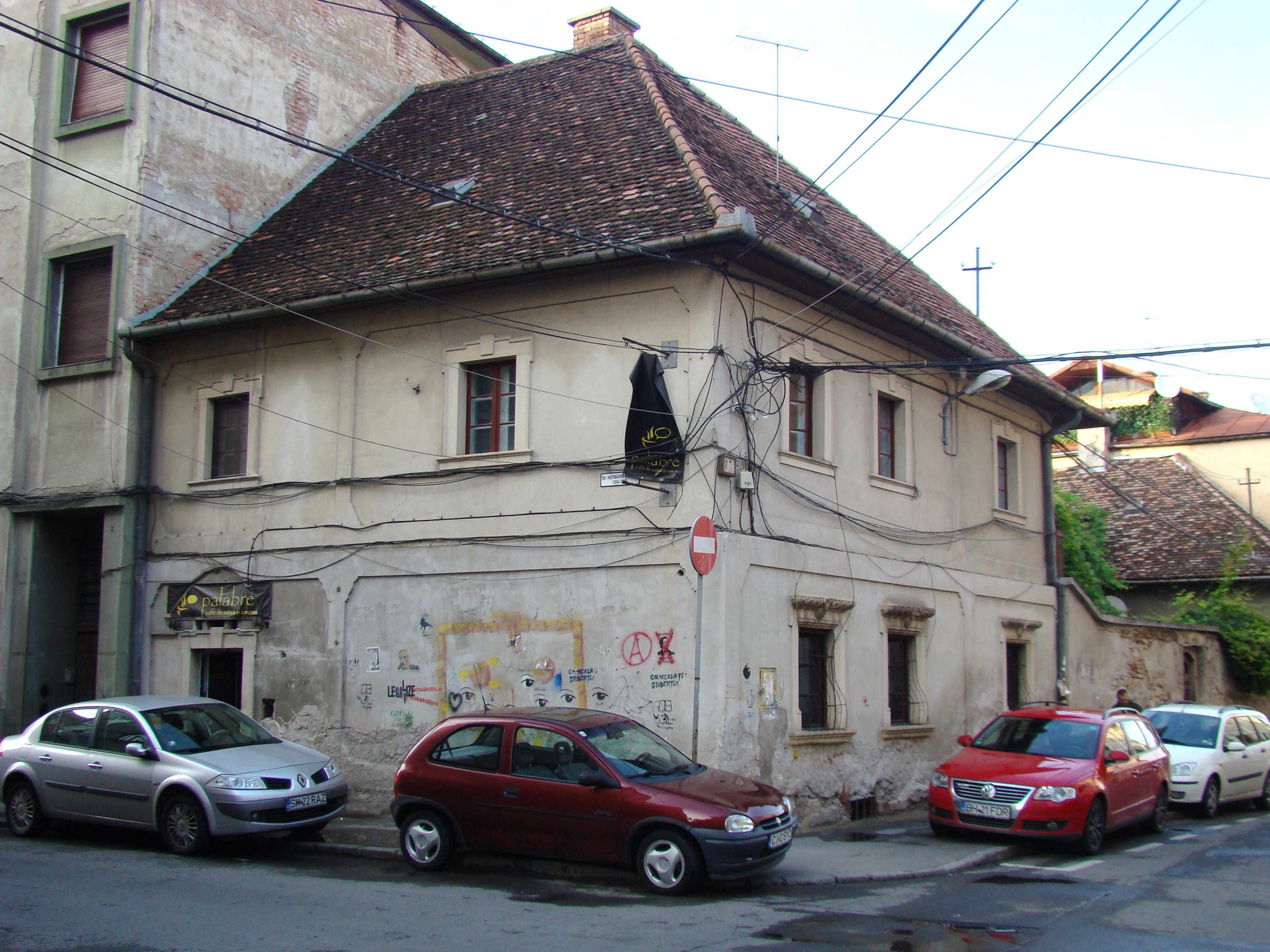 Cluj-Napoca, Casa Aurarului, str. I.C.Bratianu nr.26